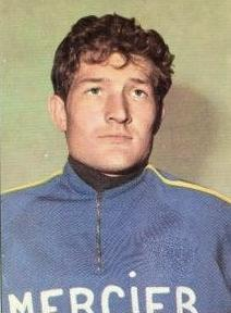 Cyrille Guimard (1971), 'Sprint 71', Panini figurina n°80.